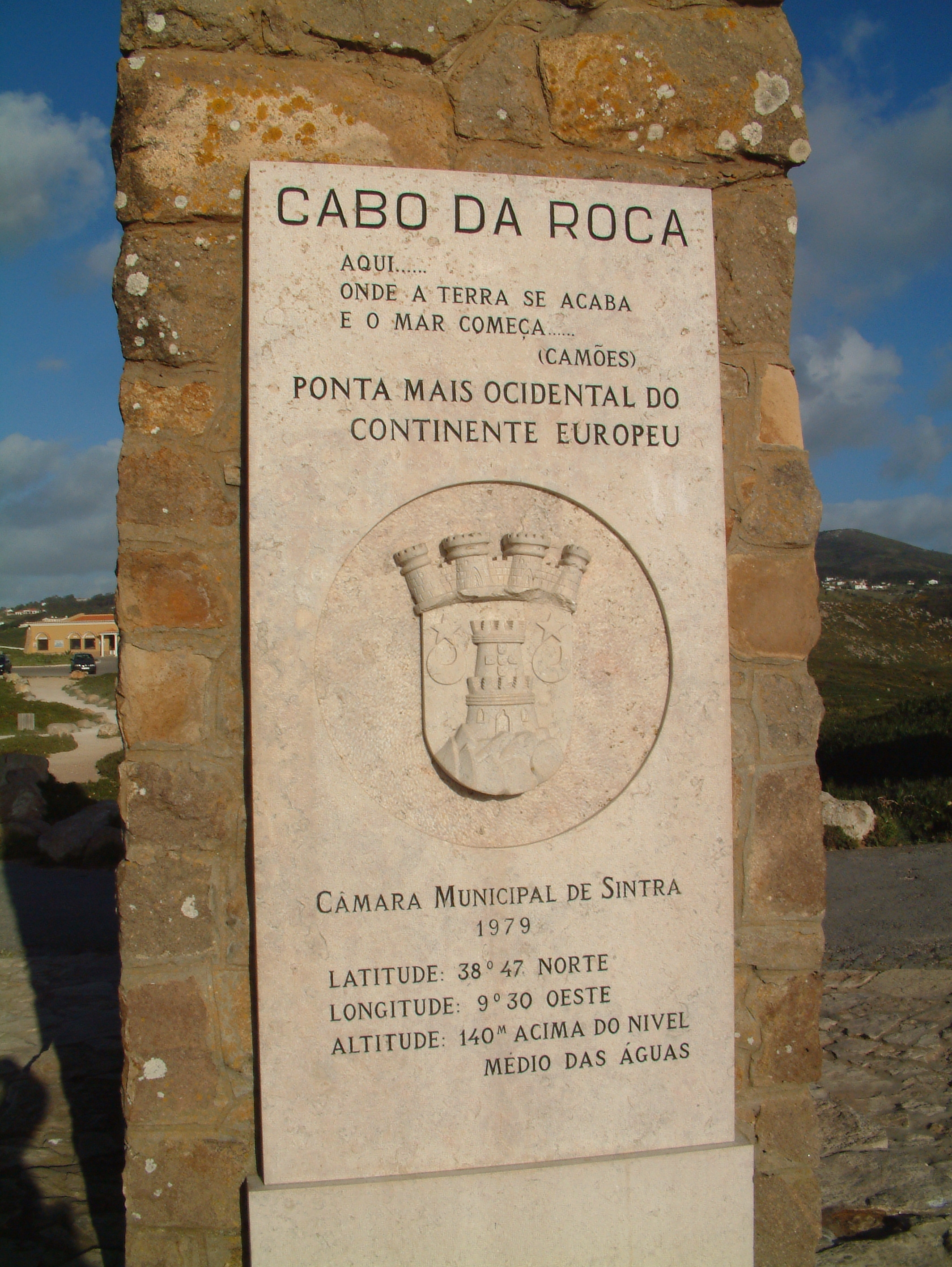 Кабо да РОКА